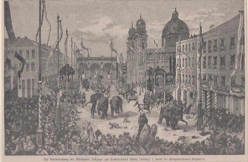 Holzschnitt eines unbekannten Künstlers zur Elefantenkatastrophe in München vom 31. Juli 1888